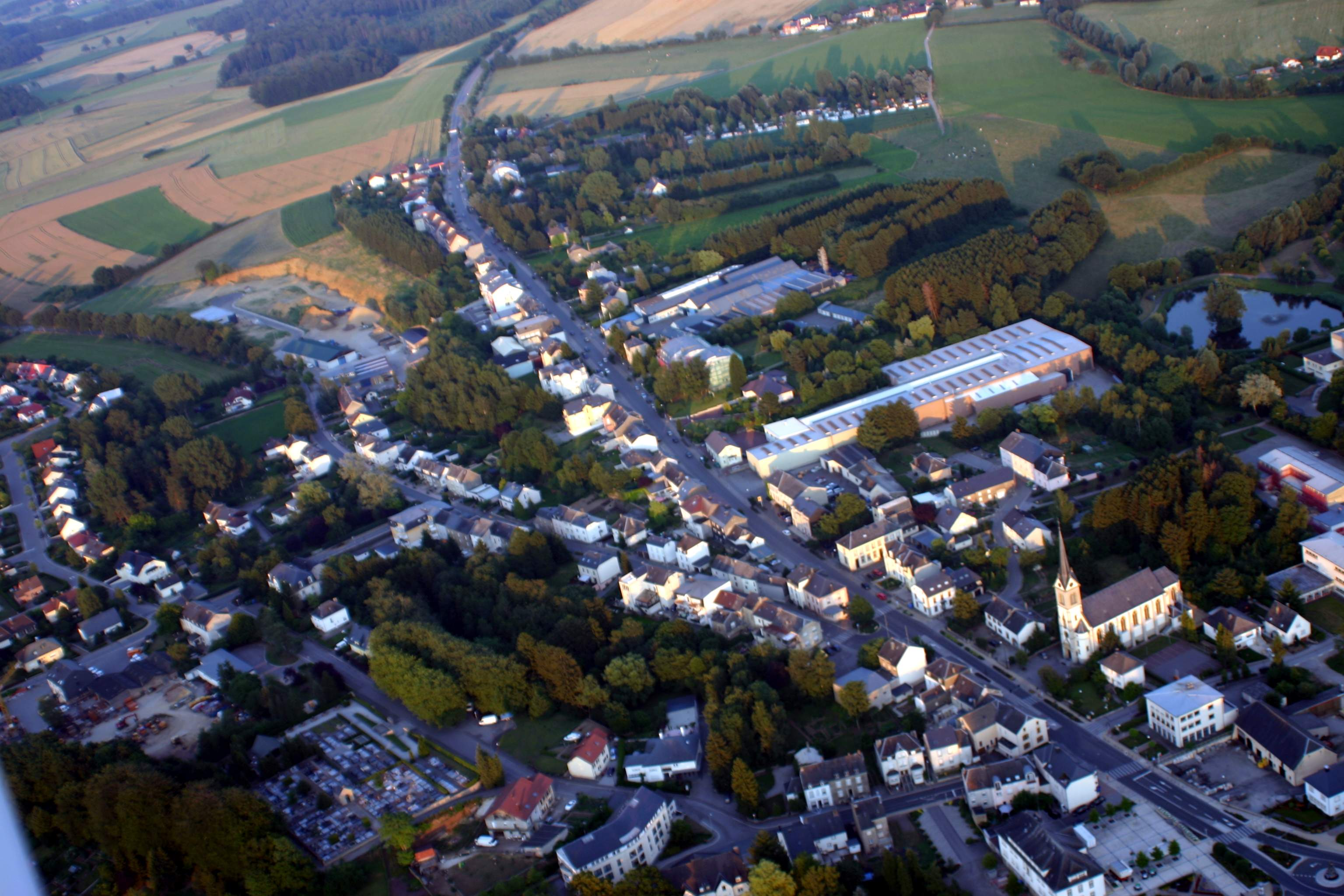 Loftopname vu Stengefort (Lëtzebuerg).